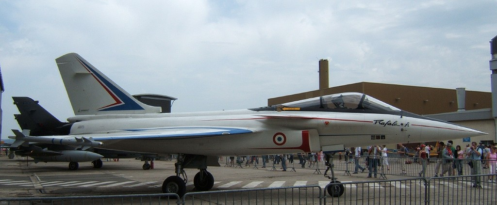 Prototype du Rafale